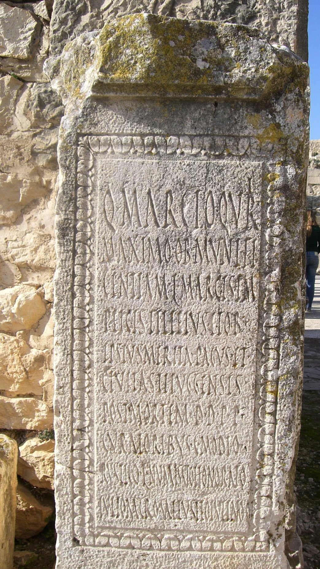 Inscripción en la entrada del anfiteatro de Dougga (Thugga). CIL VIII 26605 = AE 1951, 75 = Dougga 81 (Cf. [1], [2], A. Beschaouch, in CRAI, 139-3, 1995, p. 866 n. 21) : Q(uinto) Marcio Quir(ina) / Maximo ob munifi/centiam L(uci) Marci Sim/plicis fili(i) eius et ob / ipsius merita pagus et / civitas Thuggensis / post mortem d(ecreto) d(ecurionum) p(ecunia) p(ublica) / curatoribus C(aio) Modio / Rustico L(ucio) Numissio Honorato / Iulio Macro Sallustio Iuliano Q(uinti) f(ilio)